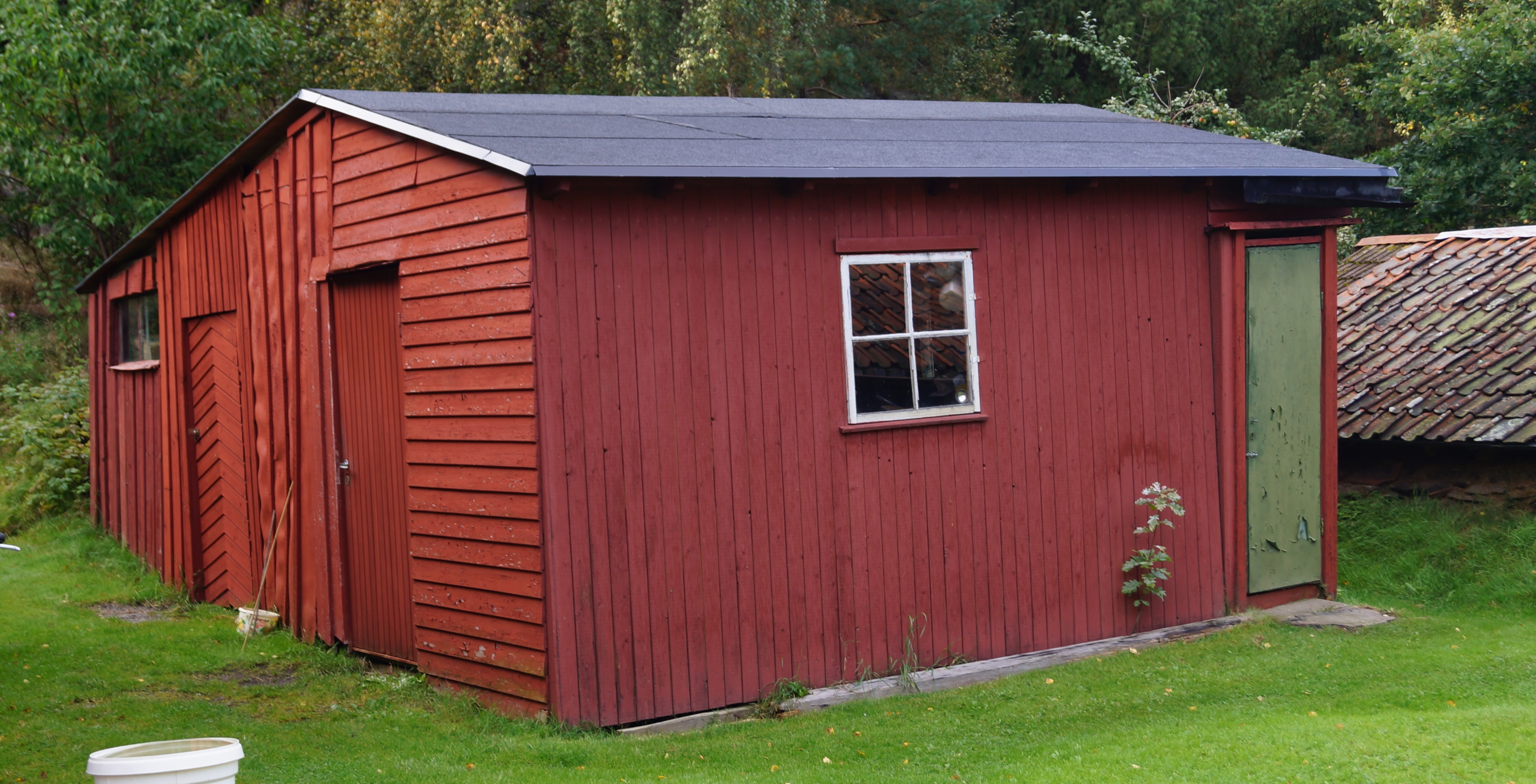 Torpet Klara ( Biskopsgården830:902) Torp Dagsverkstorp 5 Byggnader